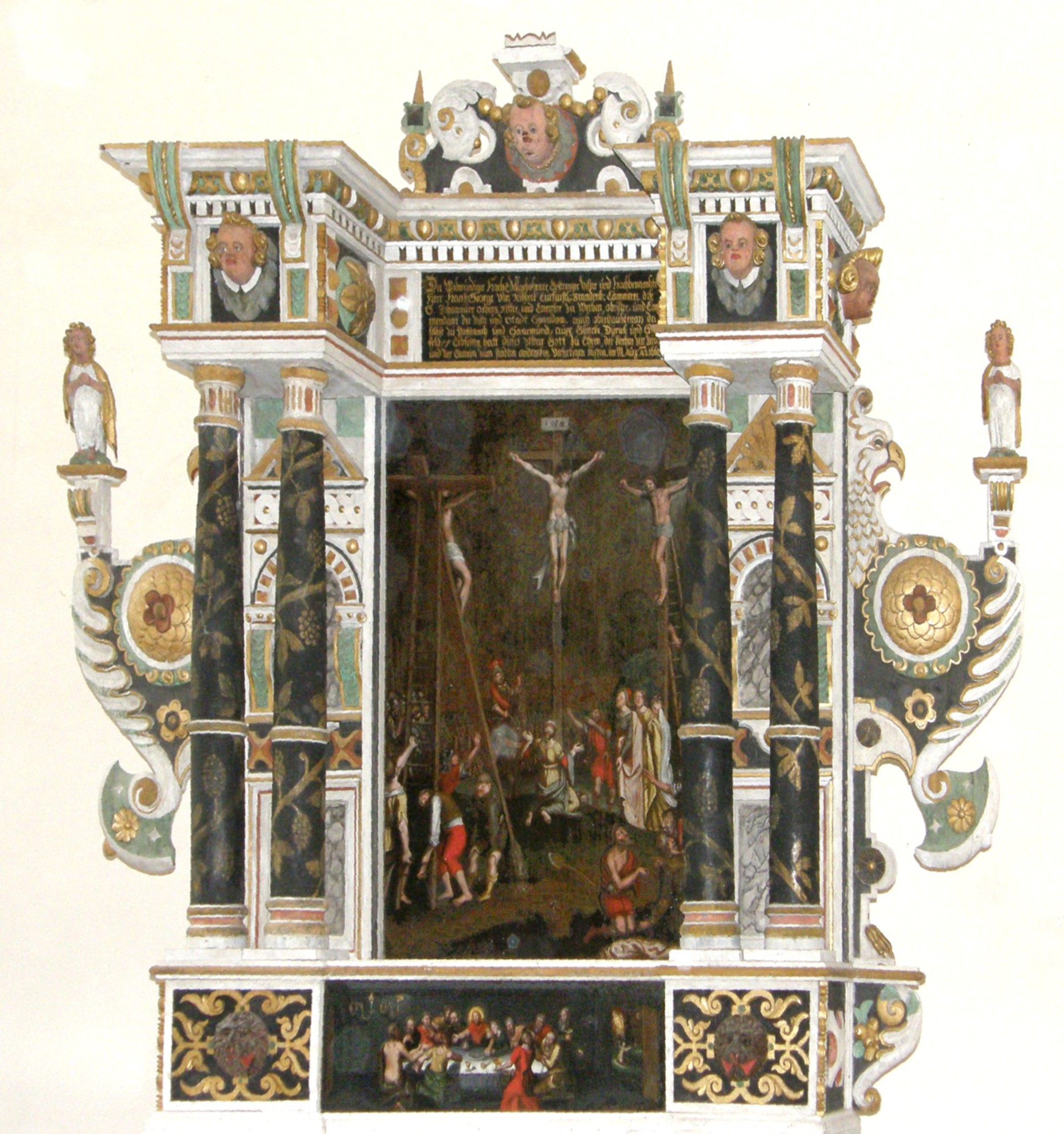 Falkensee, Altar in der Kirche Seegefeld (nachbearbeitet)